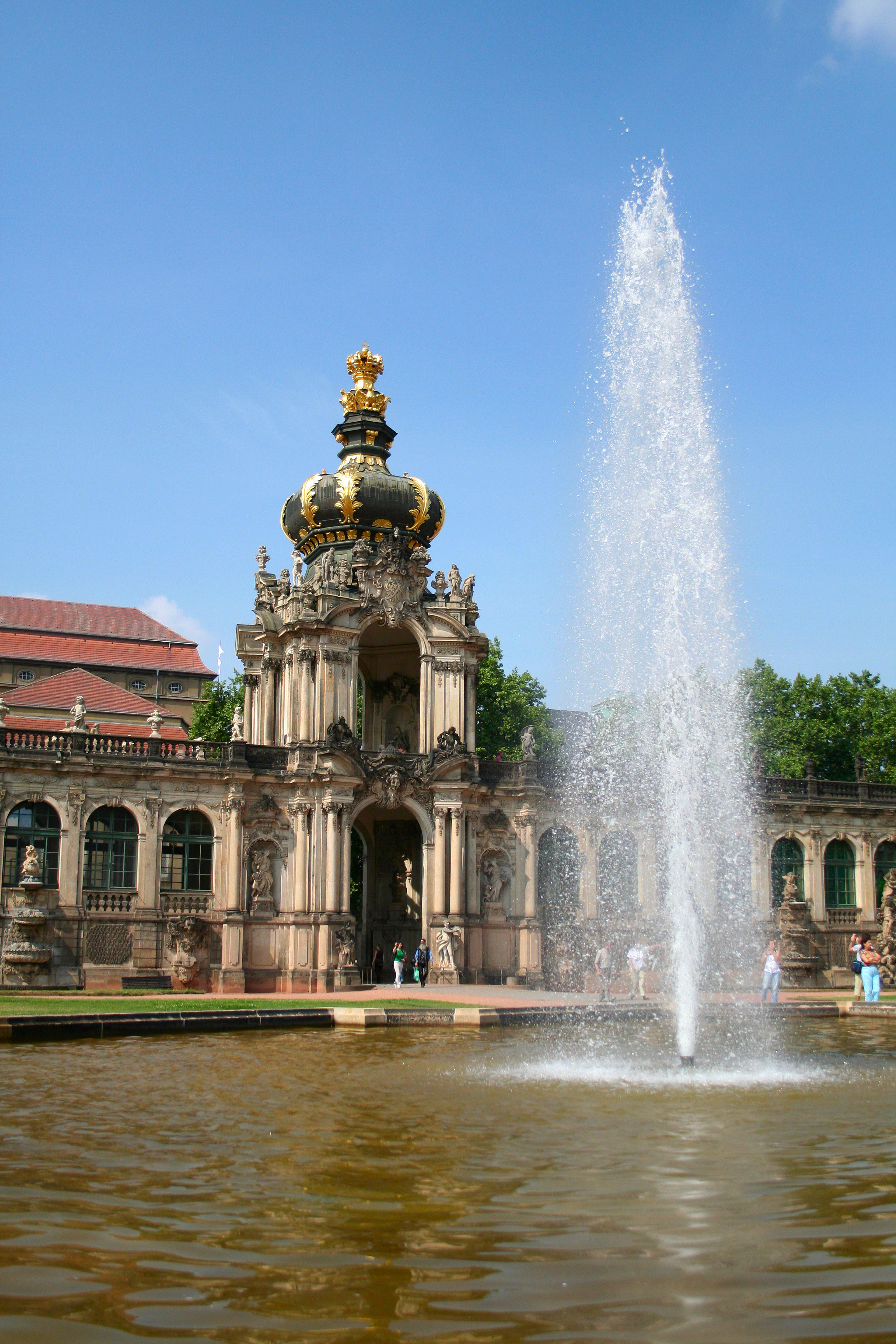 Zwinger, Dresden, Germany